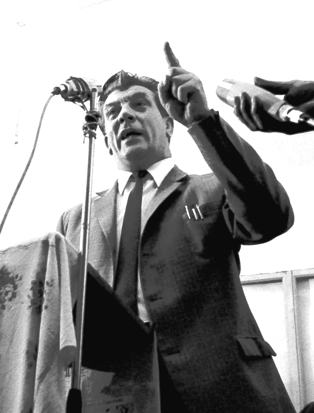 Frederik (Fré) Meis (Oude Pekela, 17 november 1921 - Groningen, 15 december 1992) was in de tweede helft van de twintigste eeuw een voorman van de CPN in de provincie Groningen. -- Fré Meis tijdens een toespraak voor stakende strokartonarbeiders in Oude Pekela. (oktober 1969)